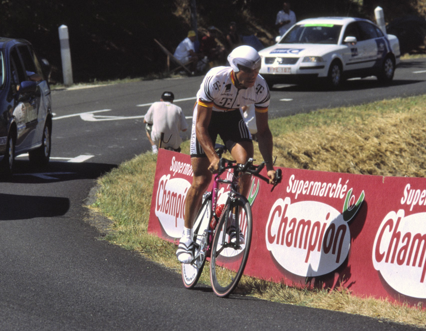 Erik Zabel Tour de France 2003, individual time trial/contre-la-montre/Zeitfahren Gaillac